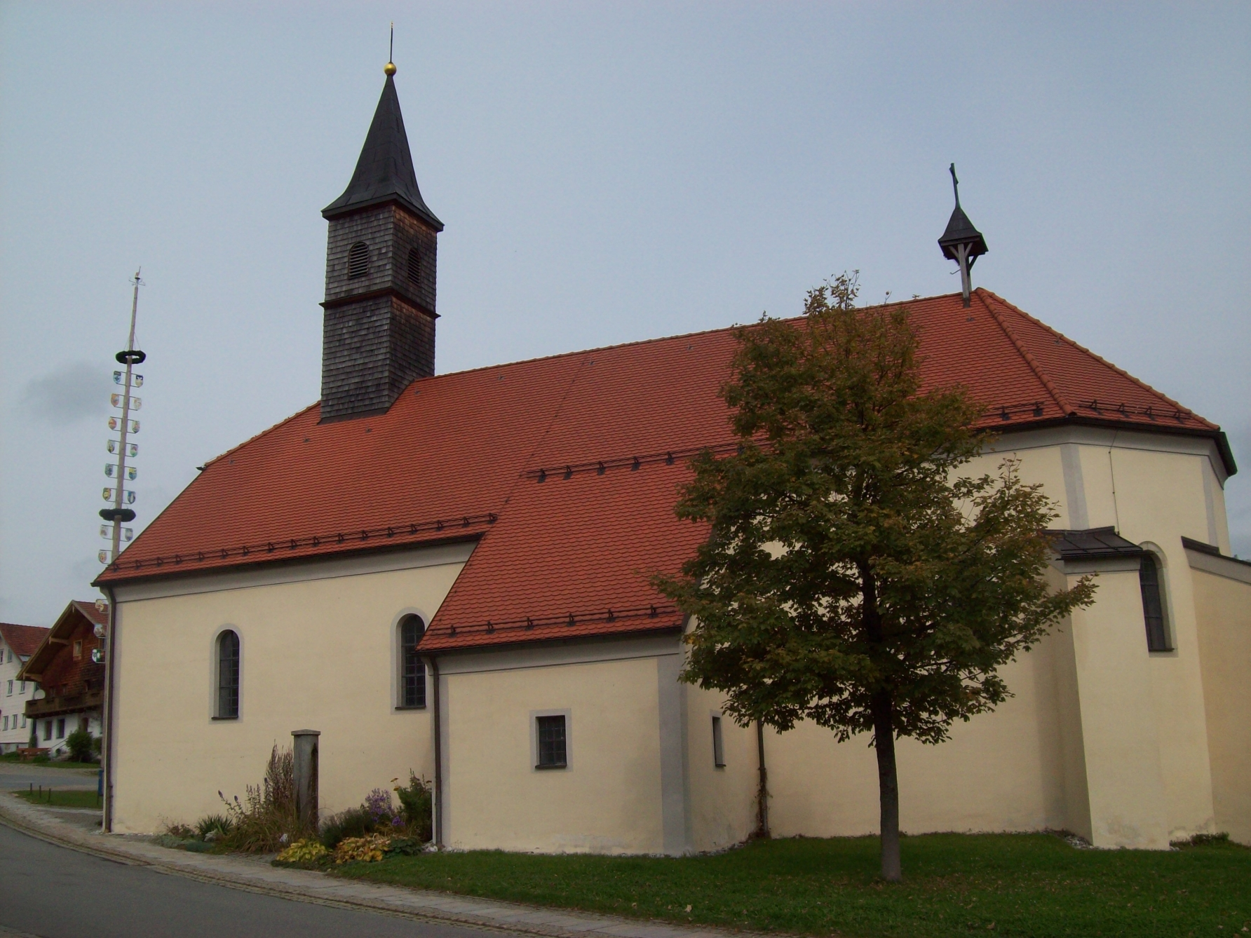 Nikolauskirche Grainet, erbaut um 1500 - Außenansicht